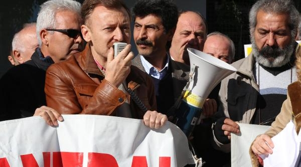 Aytuğ Atıcı Mersin Akkuyu'da yapımı devam eden nükleer santrale karşı gerçekleştirilen eylemde.